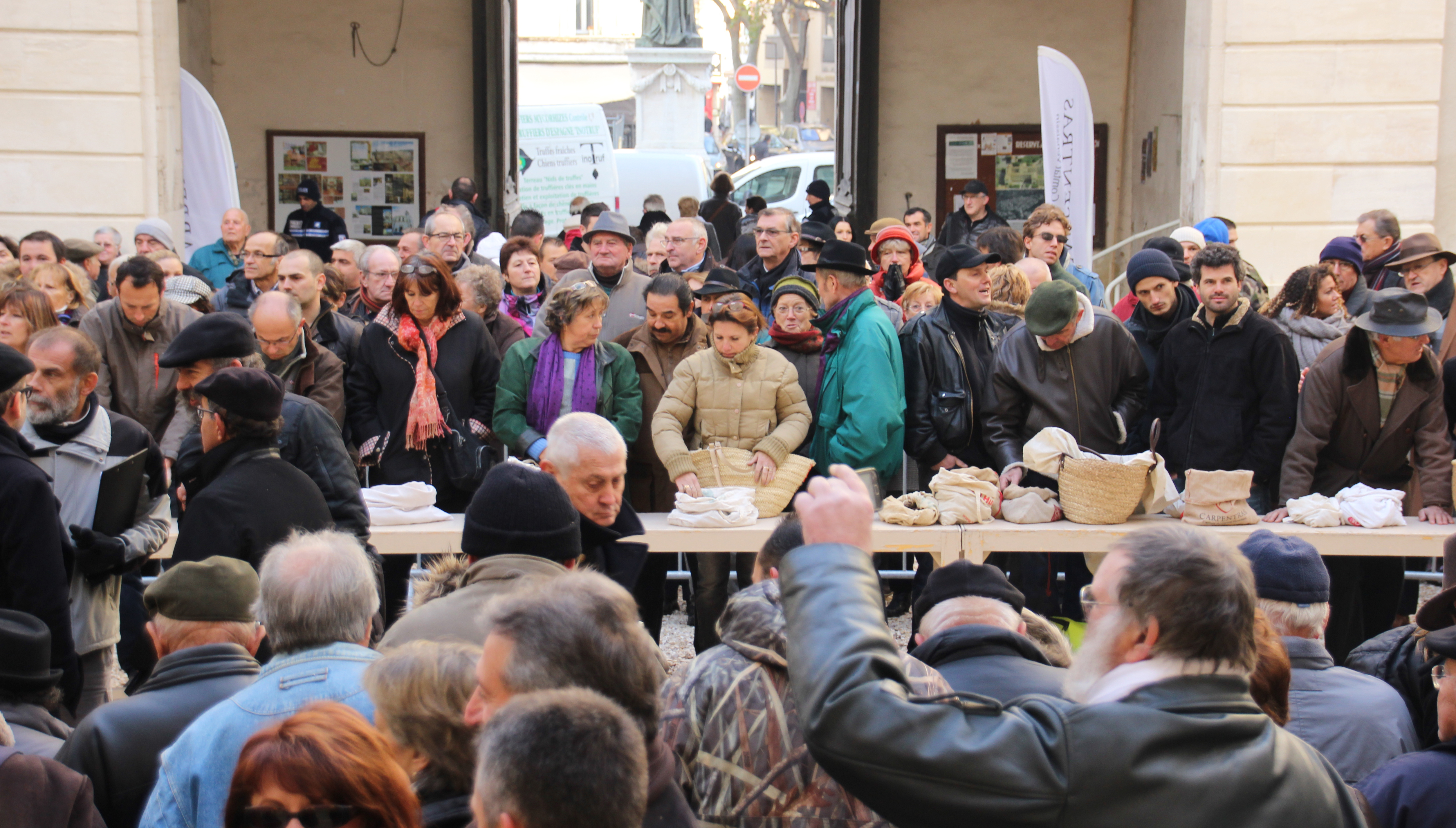 Marché aux truffes de Carpentras, le vendredi matin dans la cour d'honneur de l'Hôtel-Dieu.